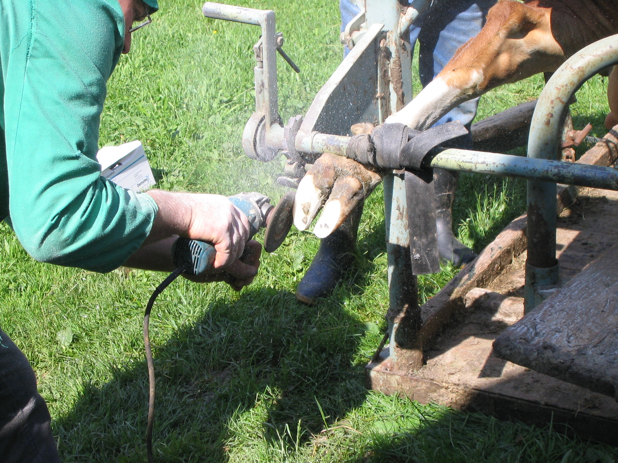 Klauenpflege beim Hausrind